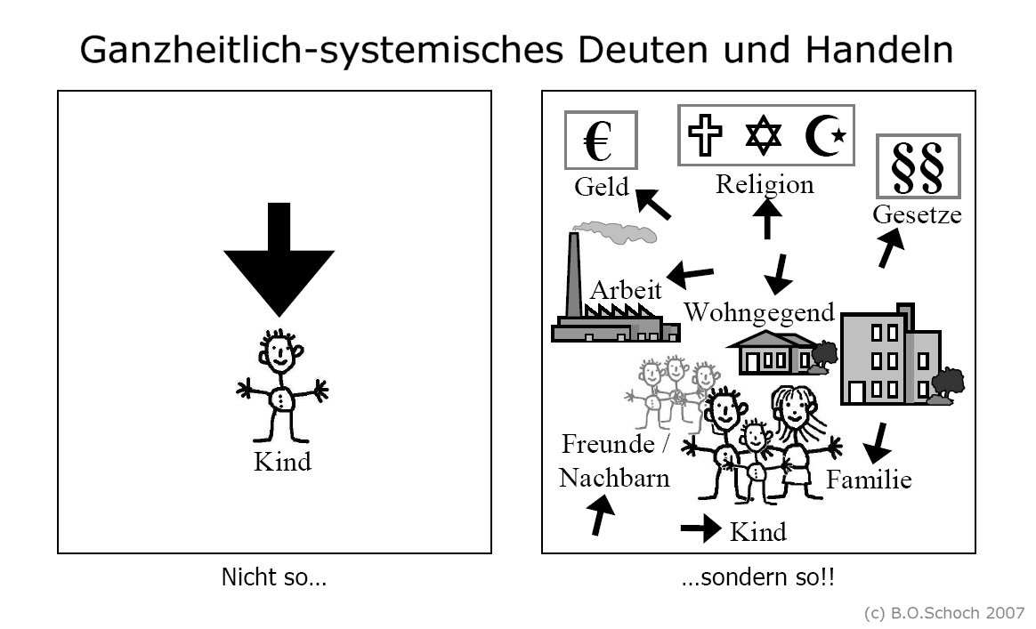 Ganzheitliches, systemisches Deuten von und Handeln in sozialen Problemlagen; Lebensweltorientierung; Lebensweltorientierte Soziale Arbeit, Kinder- und Jugendhilfe; Hans Thiersch